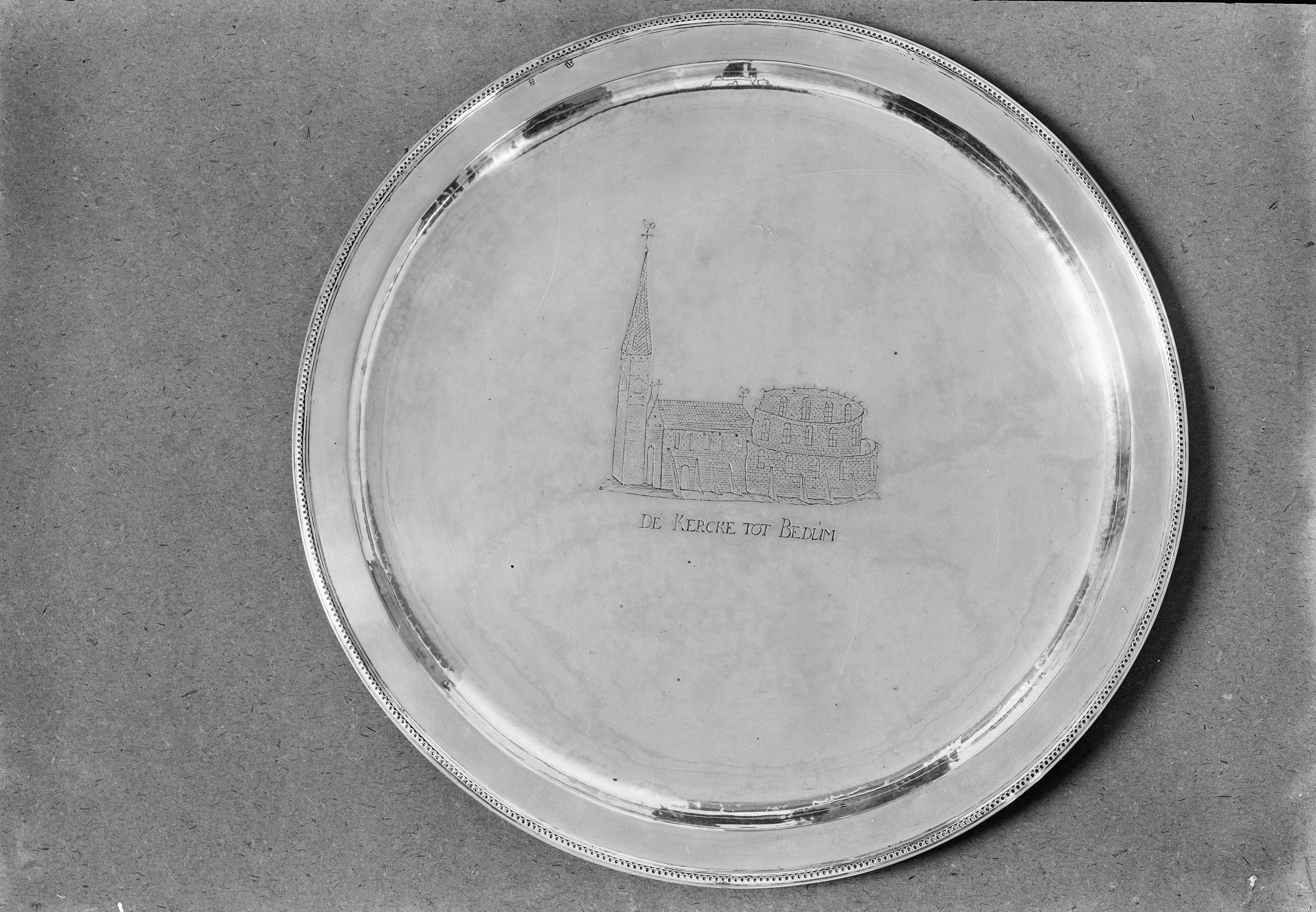 N.H.Kerk en Toren: Zilveren schaal met afbeelding van de kerk